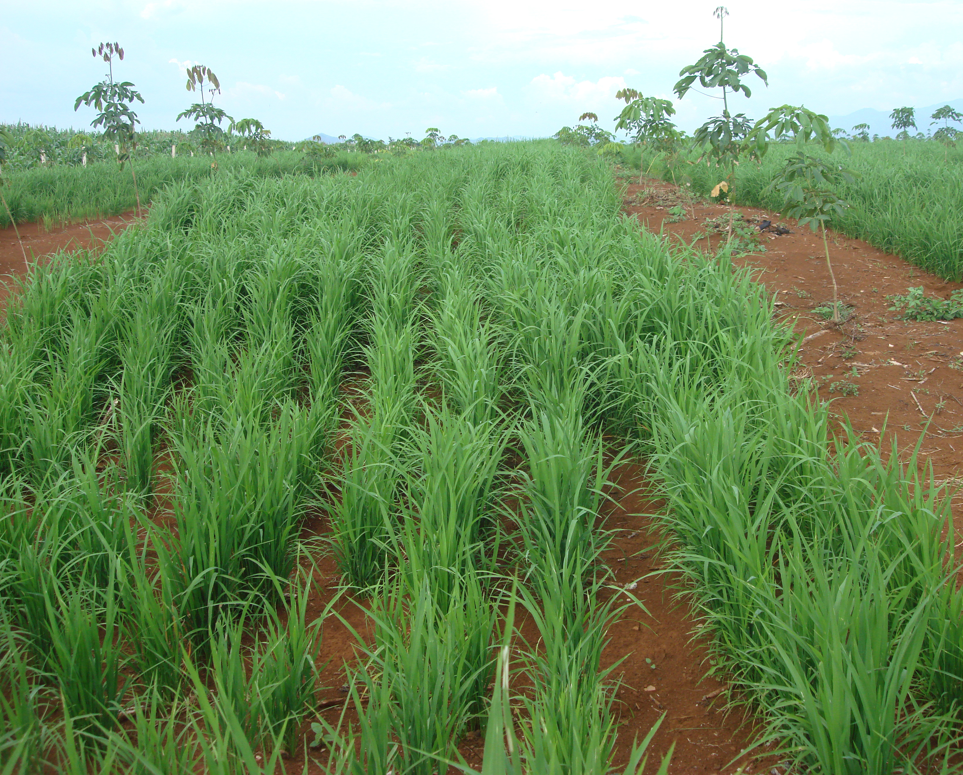 Lúa trên rẫy trông trên đất cây cao su non